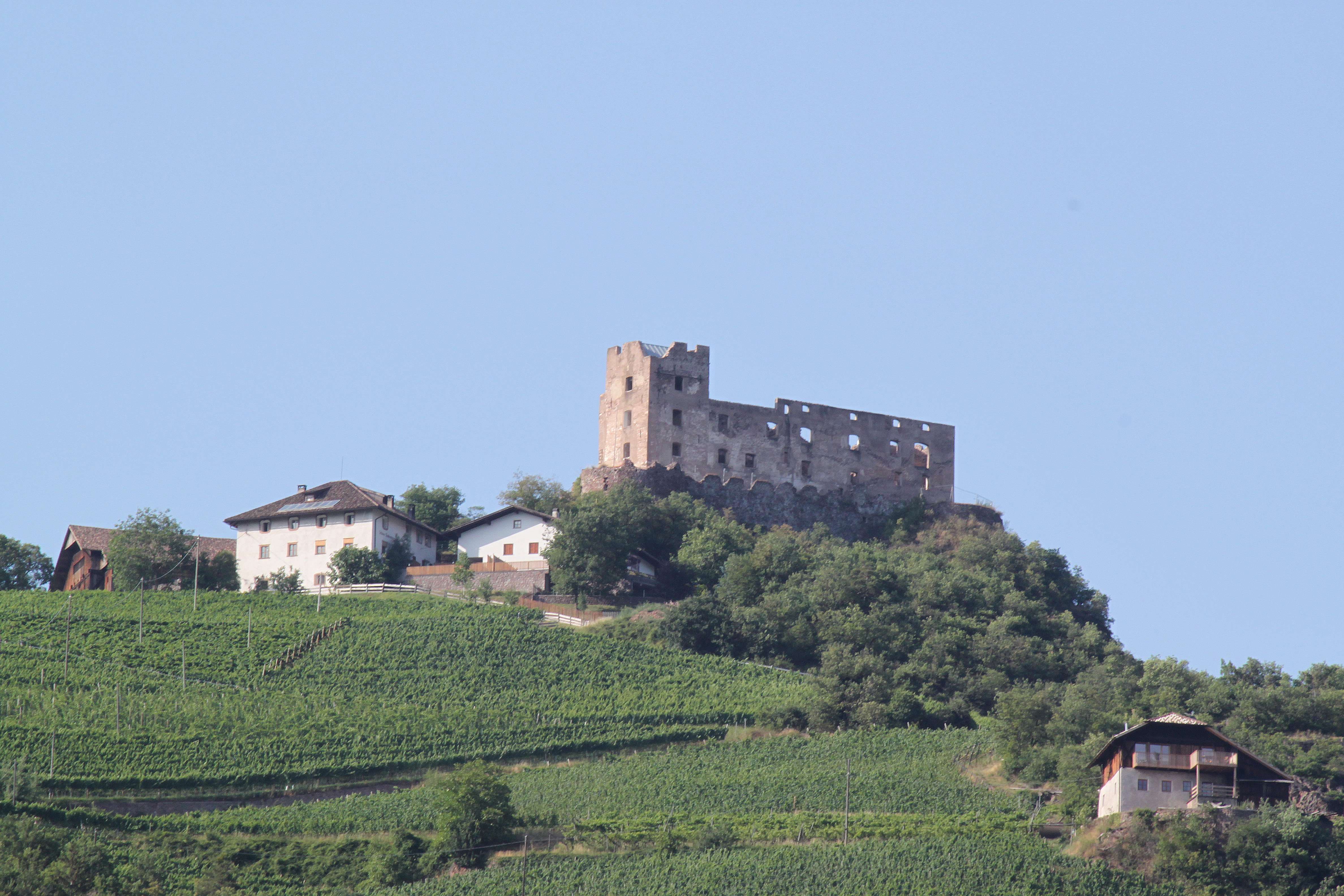 Rafenstein bei Bozen im Jahr 2013